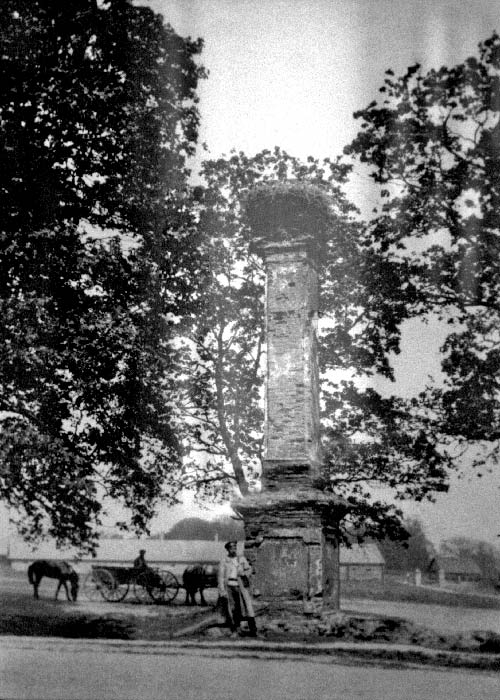 Беларуская (тарашкевіца): Беніца (Bienica). Калёна ў гонар Канстытуцыі 3 мая 1791